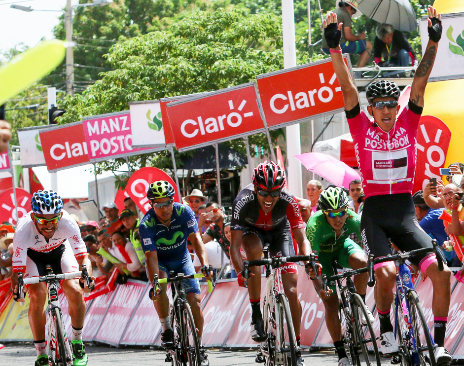 Et.7 Clásico RCN 2016. Sebastián Molano en Valledupar.